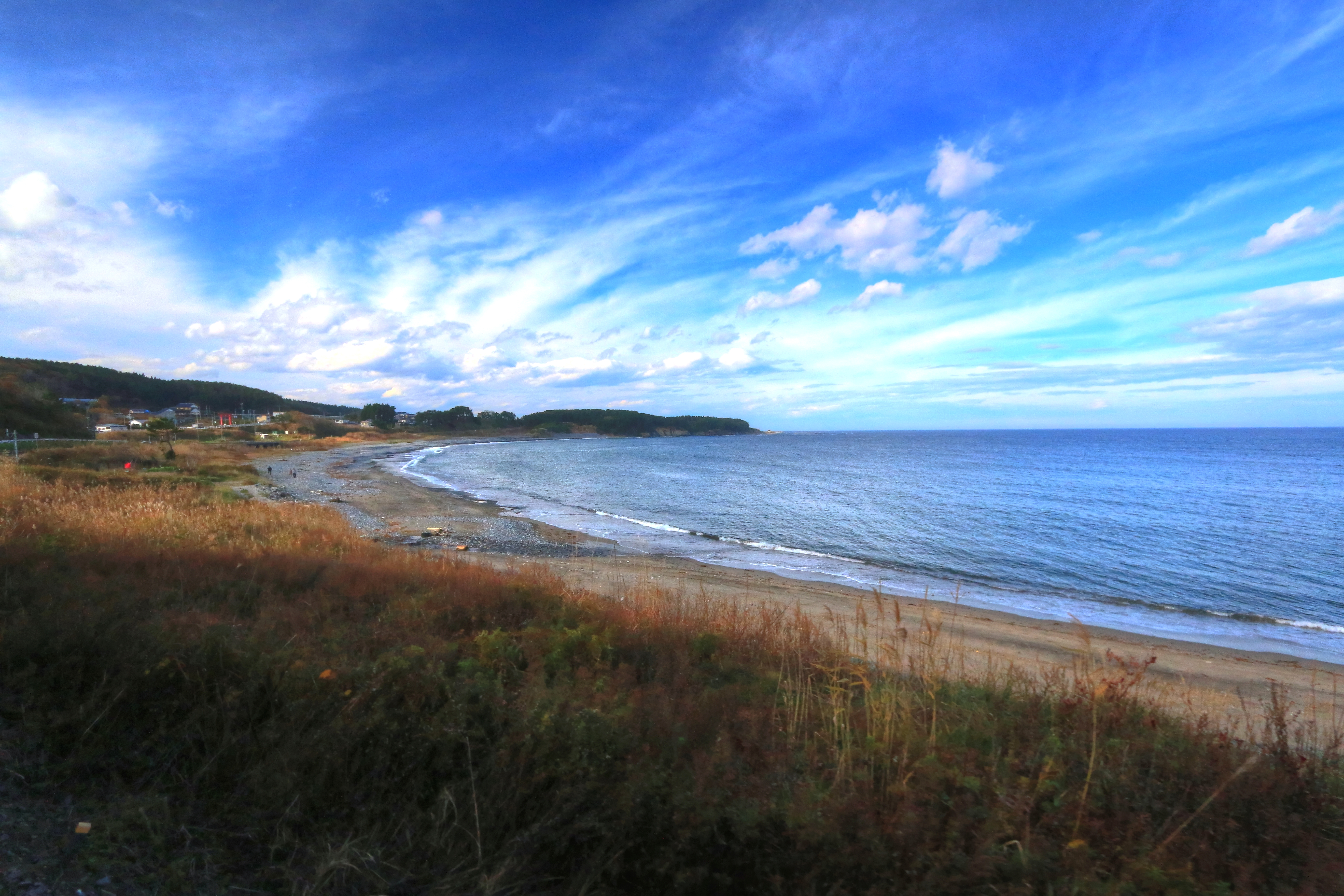 陸中八木駅付近の風景